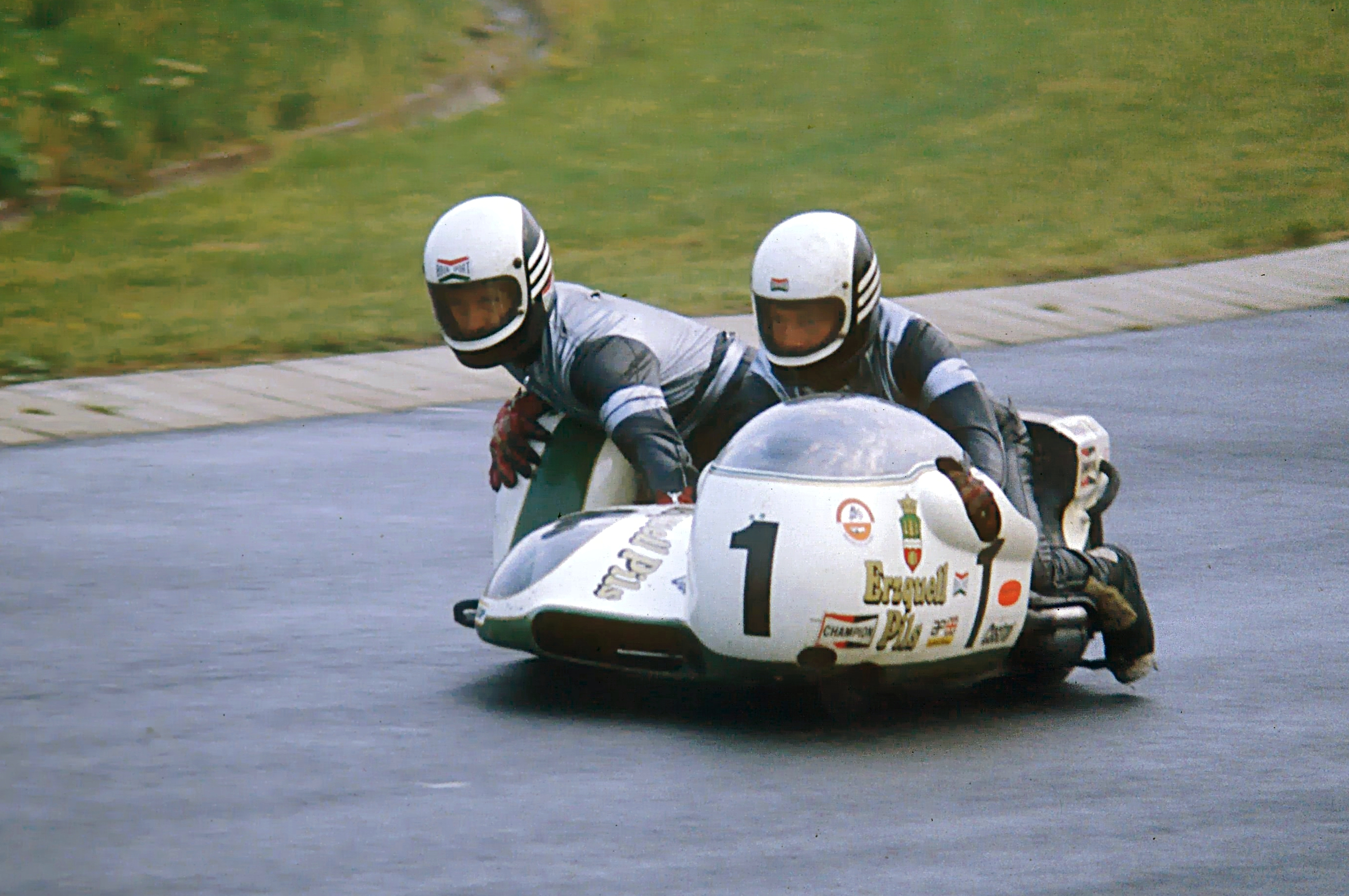 Rolf Steinhausen/Sepp Huber auf Busch-König BSA 2 beim Training zum GP von Deutschland auf dem Nürburgring